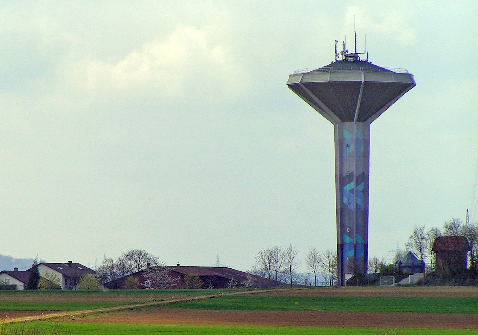 Der Markgröninger Wasserturm im Jahr 2004 gesehen ungefähr von Nordost.